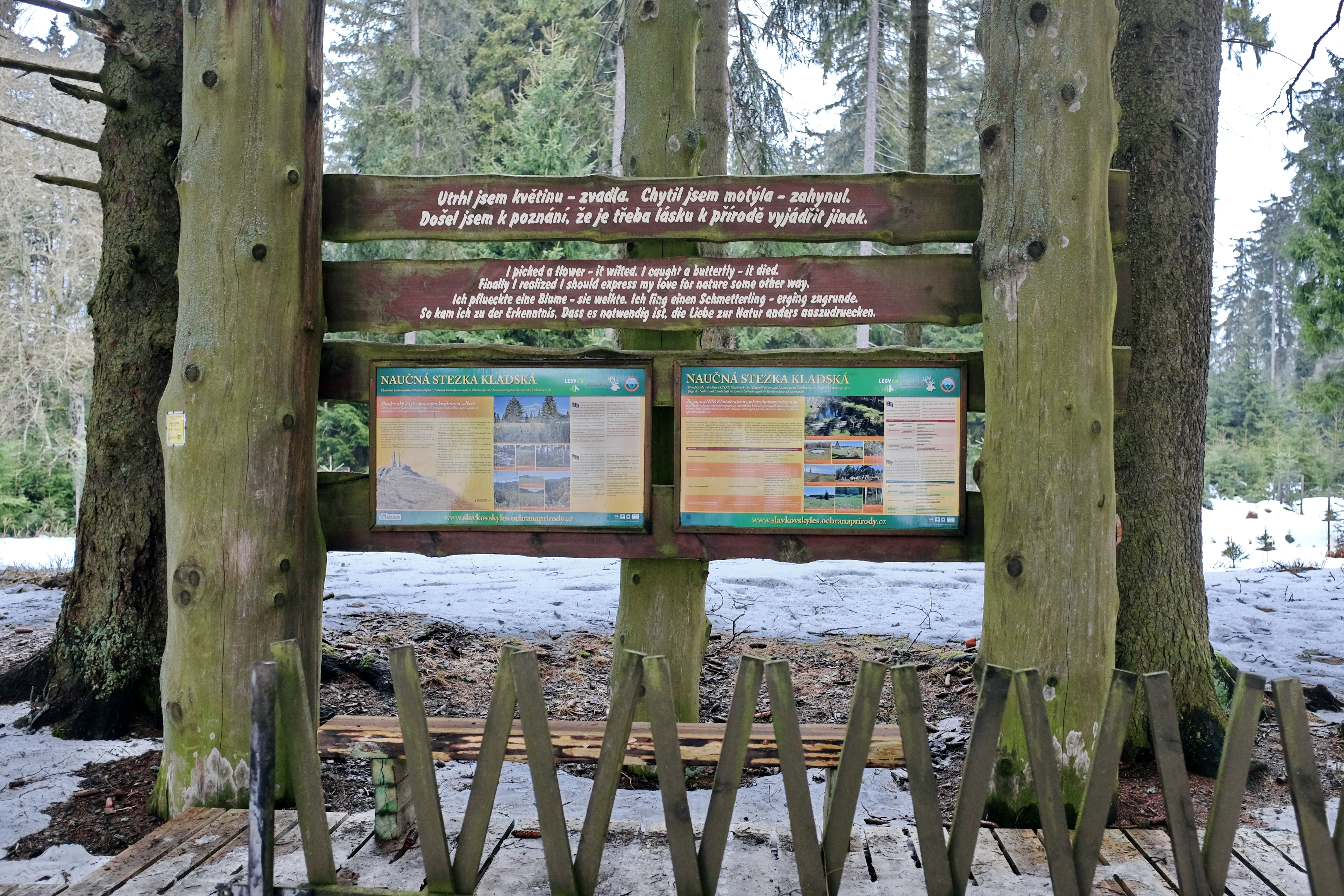 Národní přírodní rezervace Kladské rašeliny, naučná stezka, infopanel na naučné stezce